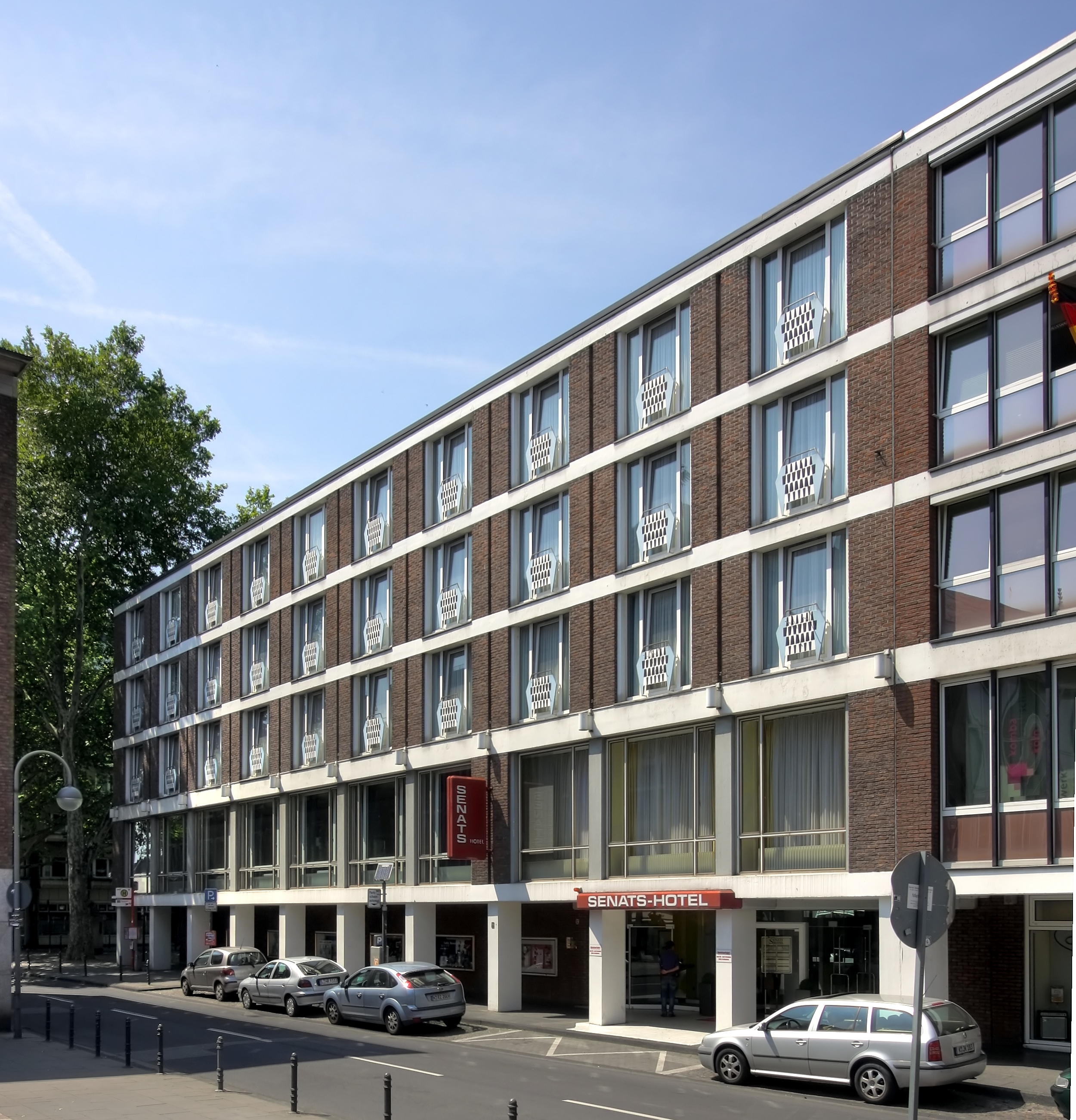 Senats-Hotel, Unter Goldschmied 9, Köln. Architekt: Wilhelm Koep, Baujahr: 1958. Ansicht von der Straße Unter Goldschmied mit dem Eingang zum Hotel.